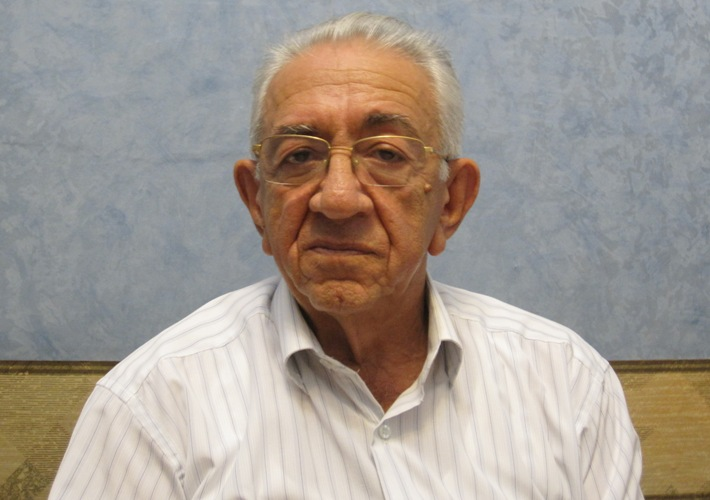 Vəfa Quluzadə